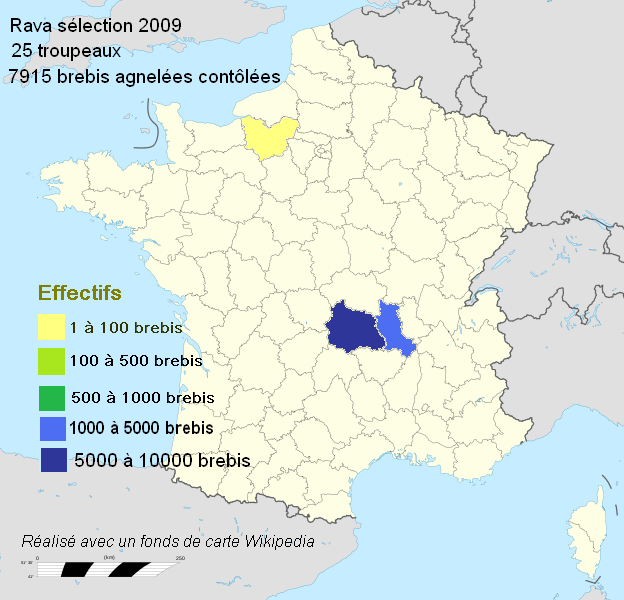 Répartition des brebis de race Rava soumises au contrôle des performances en 2009 (Source Institut de l'Elevage, département Génétique)